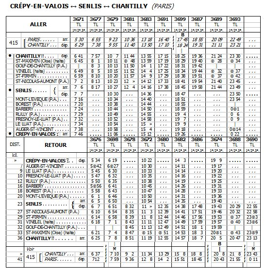 Horaire d'été 1936 de la ligne NORD Chantilly-Gouvieux - Senlis - Crépy-en-Valois, d'après l'indicateur Chaix.